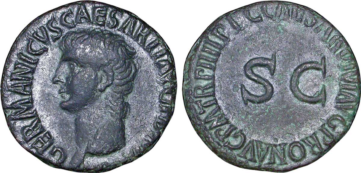 As à l'effigie de Germanicus Date : 40-41